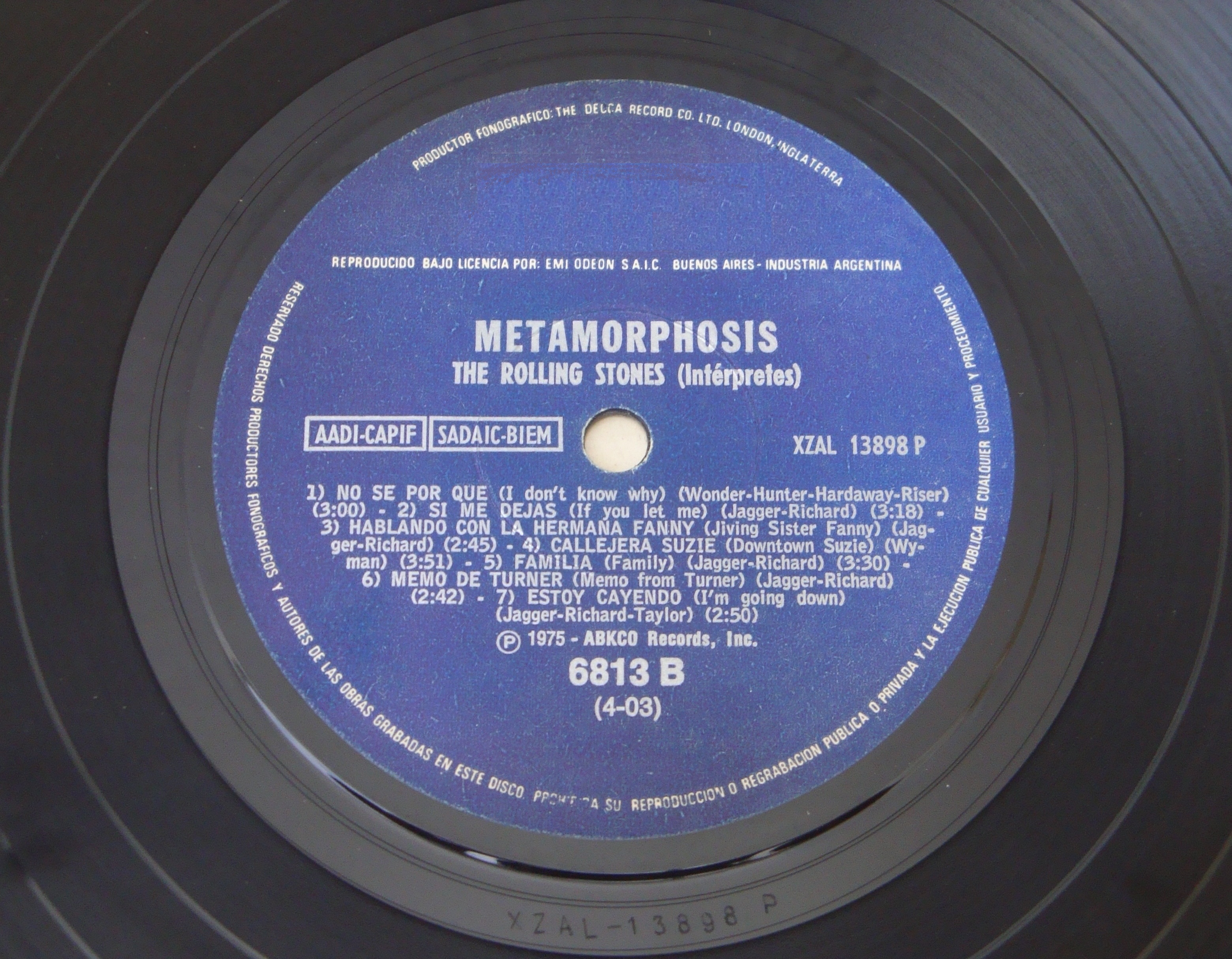 Fotografía tomada por mi del álbum "Metamorphosis" de The Rolling Stones, editado por London Records en 1975 en formato vinilo.